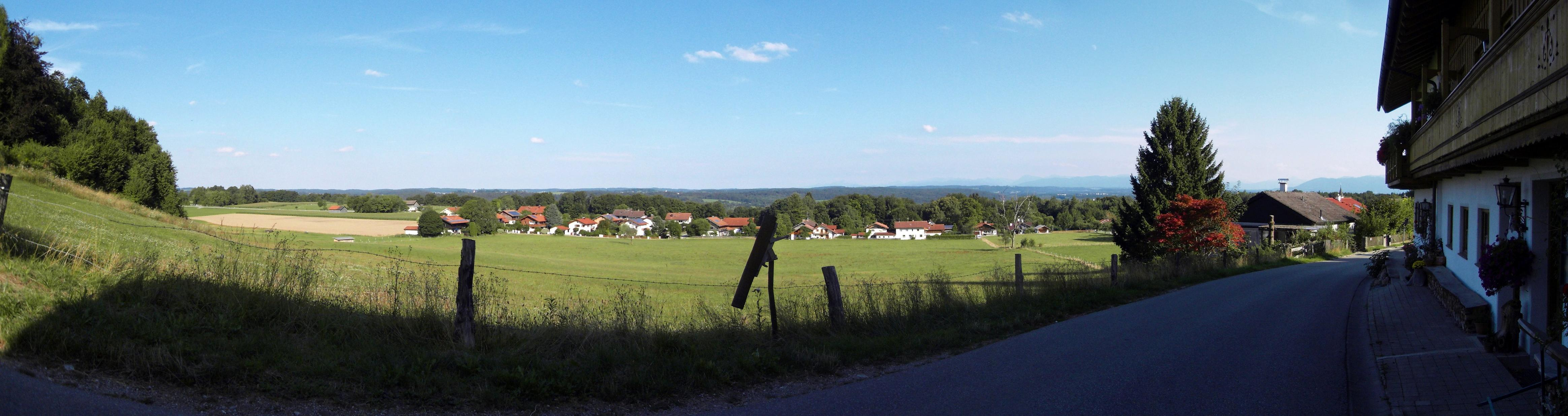 Am Radweg Starnberg - Wolfratshausen